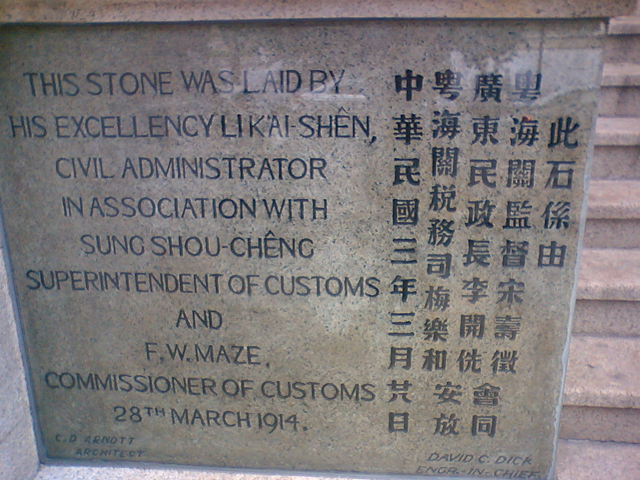 粤海关的奠基石。